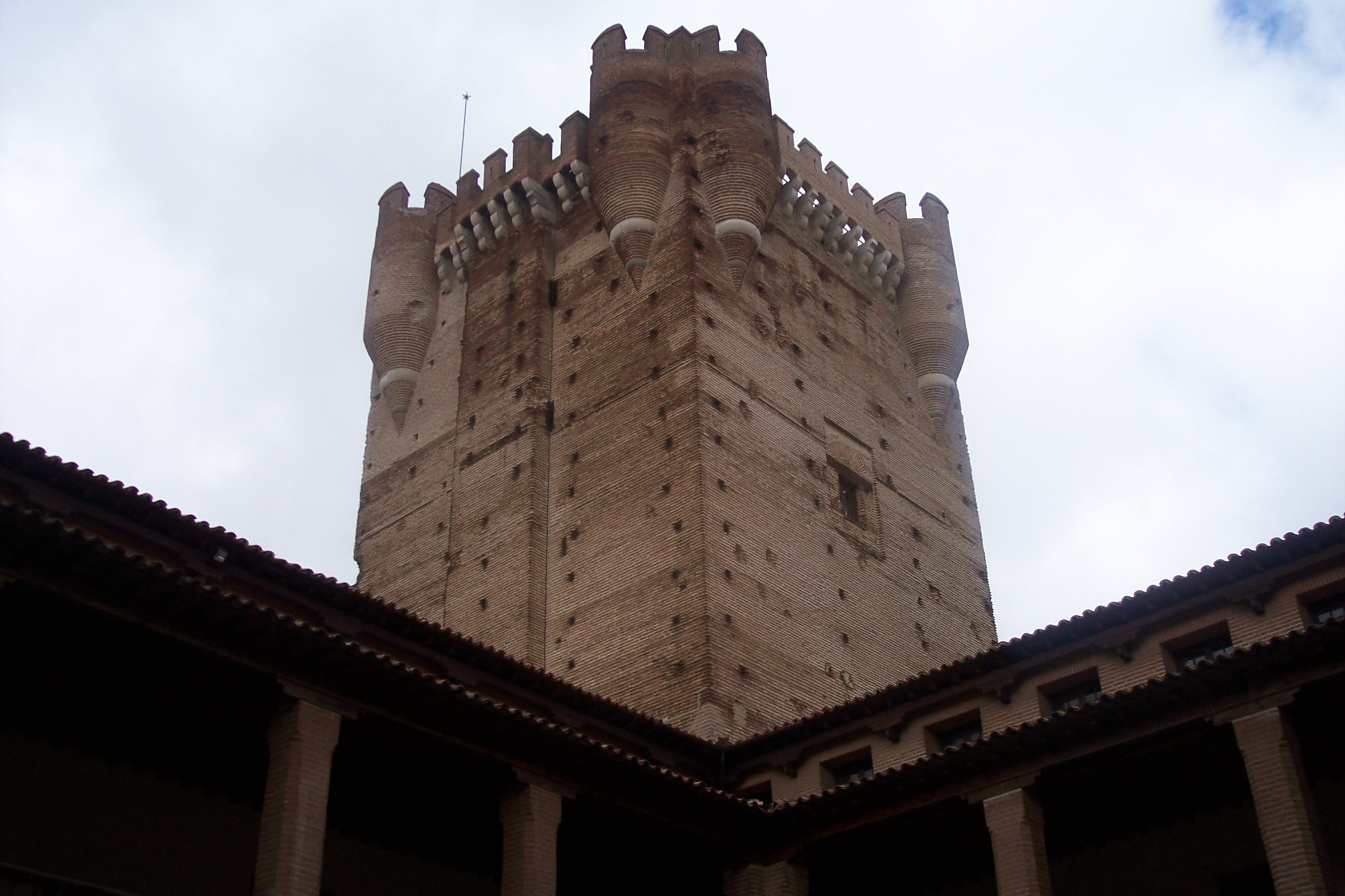 Torre del Homenaje del Castillo de La Mota viste desde el patio de armas. Medina del Campo, Valladolid (España).